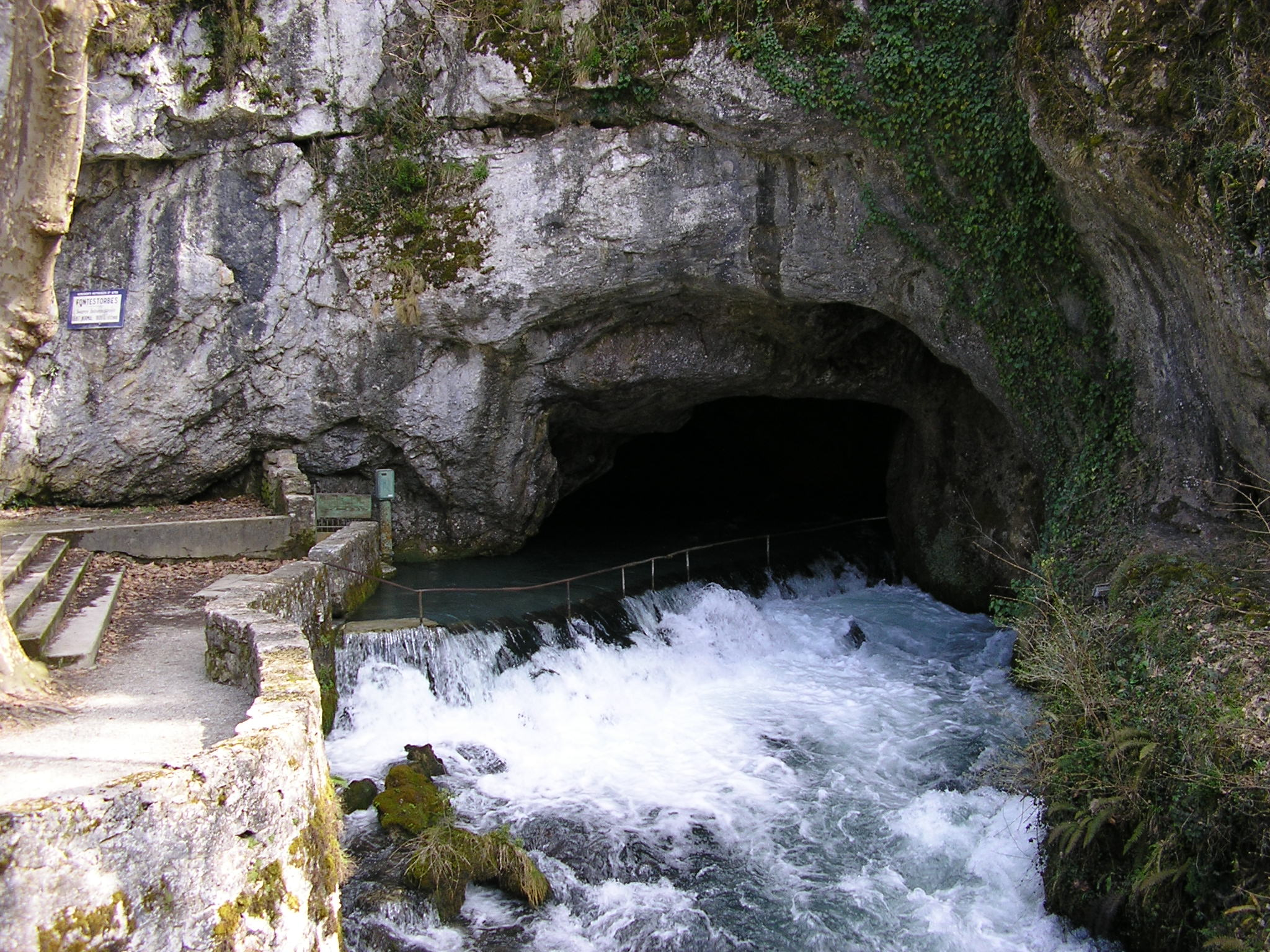 La fontaine intermittente de Fontestorbes à Bélesta (09), Midi-Pyrénées, France pris en photo par moi-même Utilisateur:Audouy